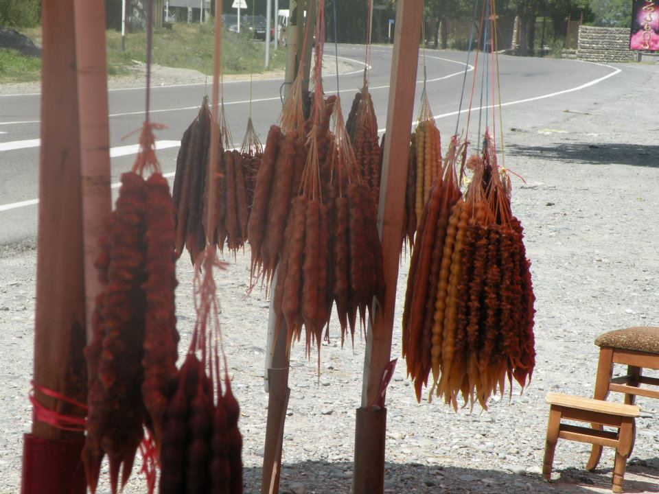 différents sortes de tchurtchkhéla.